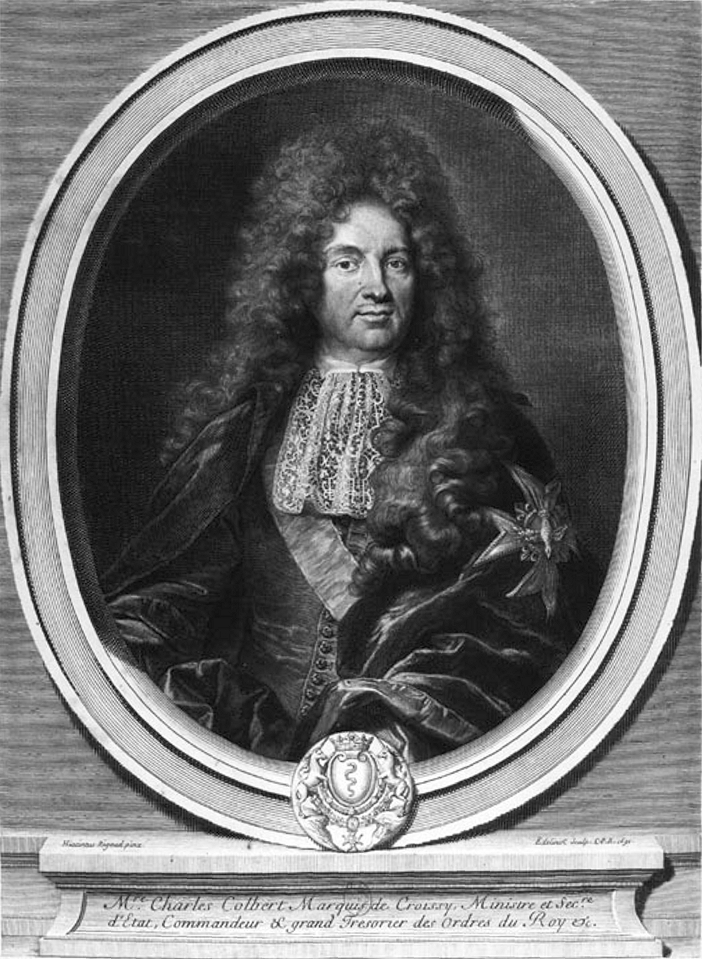 Portrait of Charles Colbert de Croissy (1625-1696)